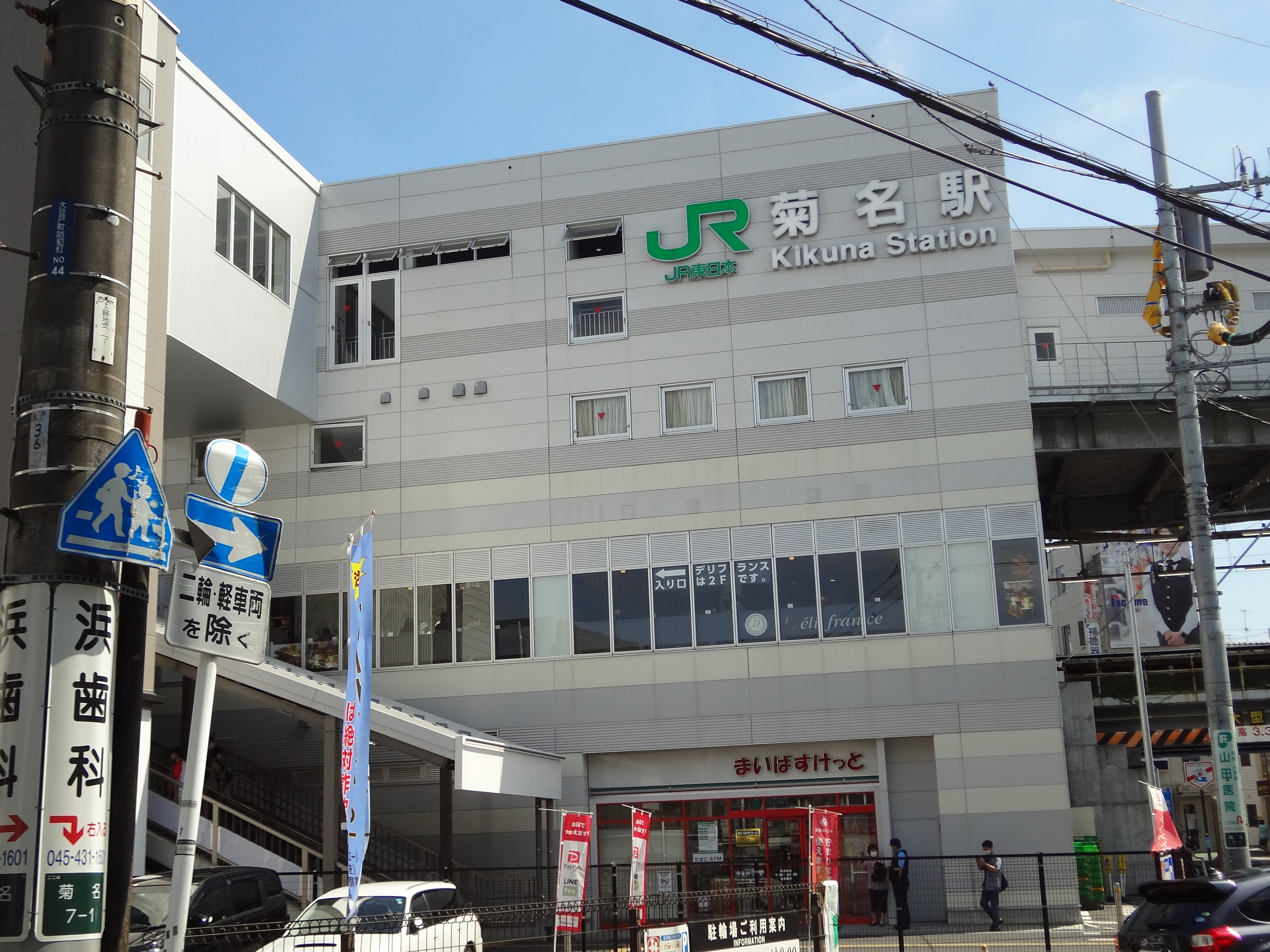 ＪＲ菊名駅舎